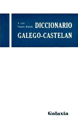 Diccionario galego-castelán.